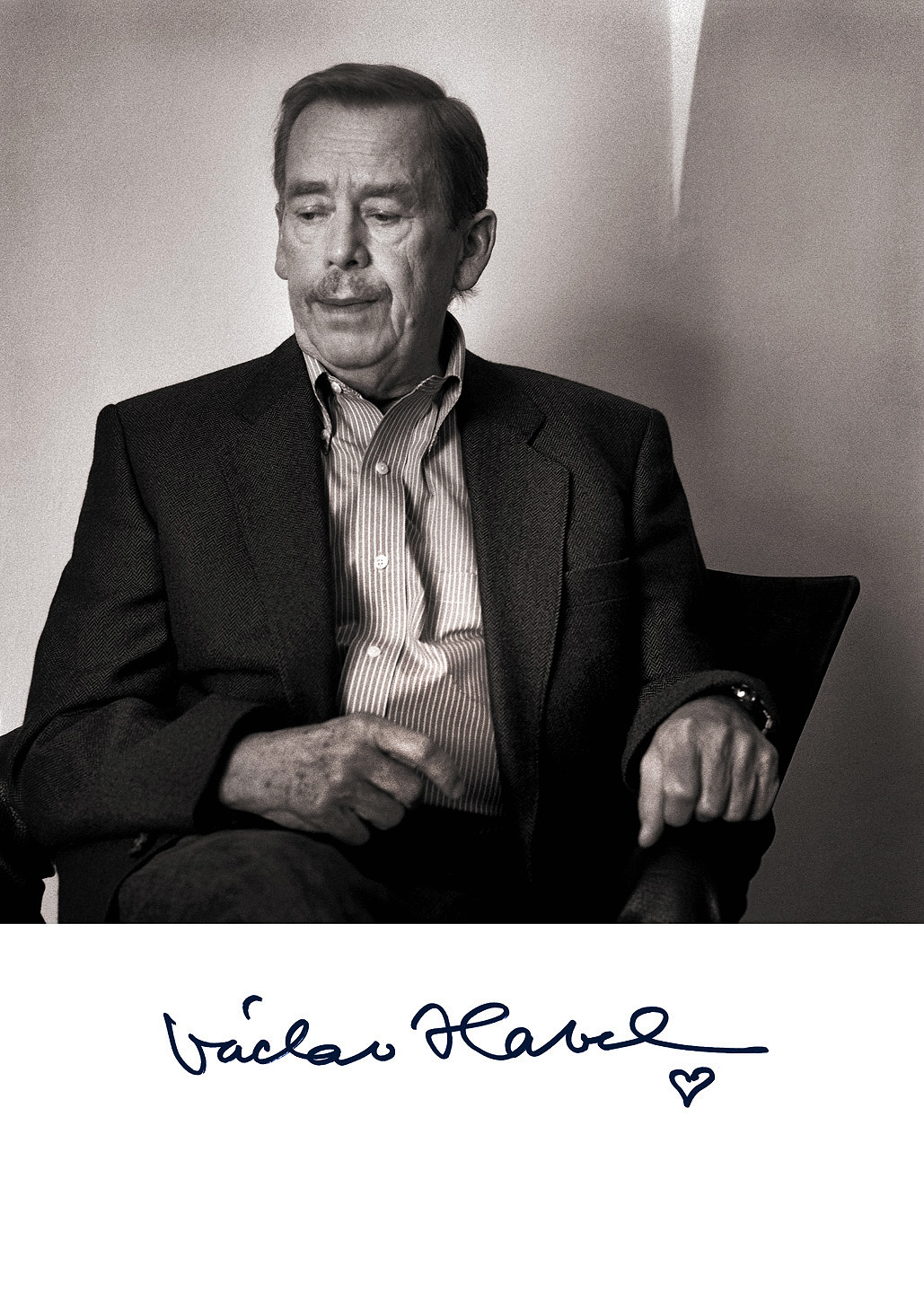 Jiří Jiroutek´s picture Cyklus: Osobnosti